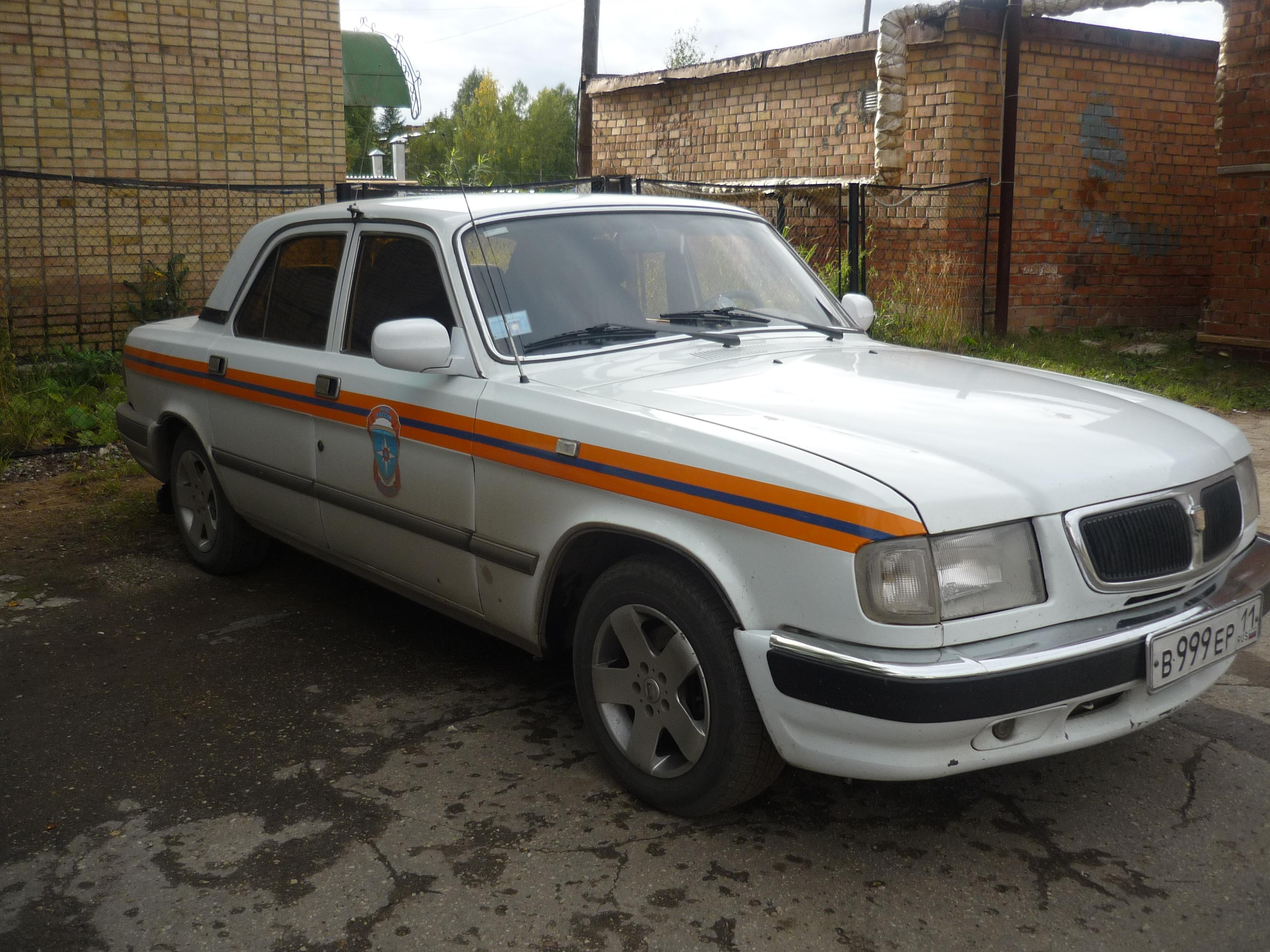 Автомобиль МЧС, ГАЗ-3110 Волга, Ухта